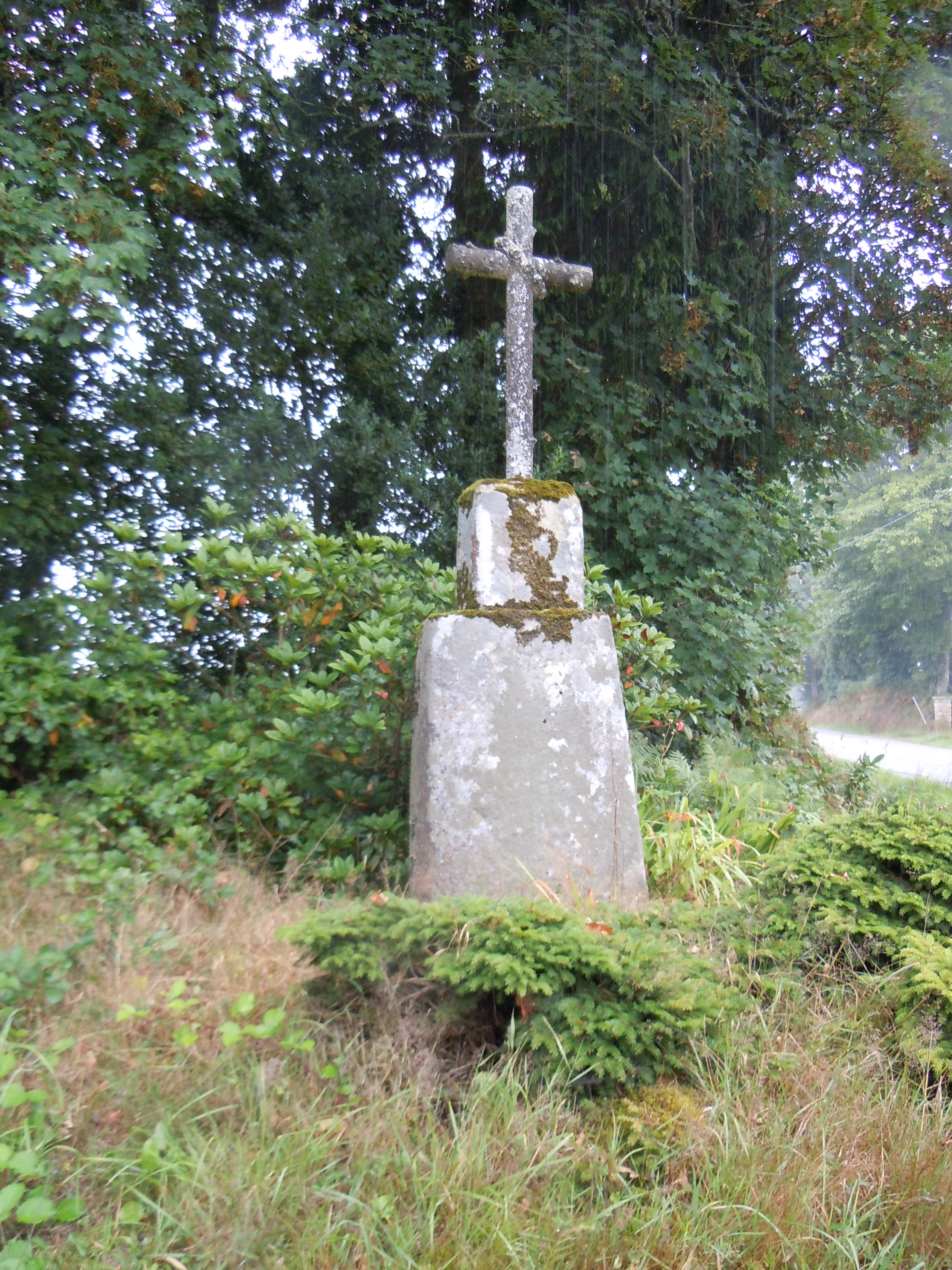 croix de Saint-Ildut, Ploërdut, département du Morbihan, France; remploi d'une ancienne stèle de l'Âge du fer